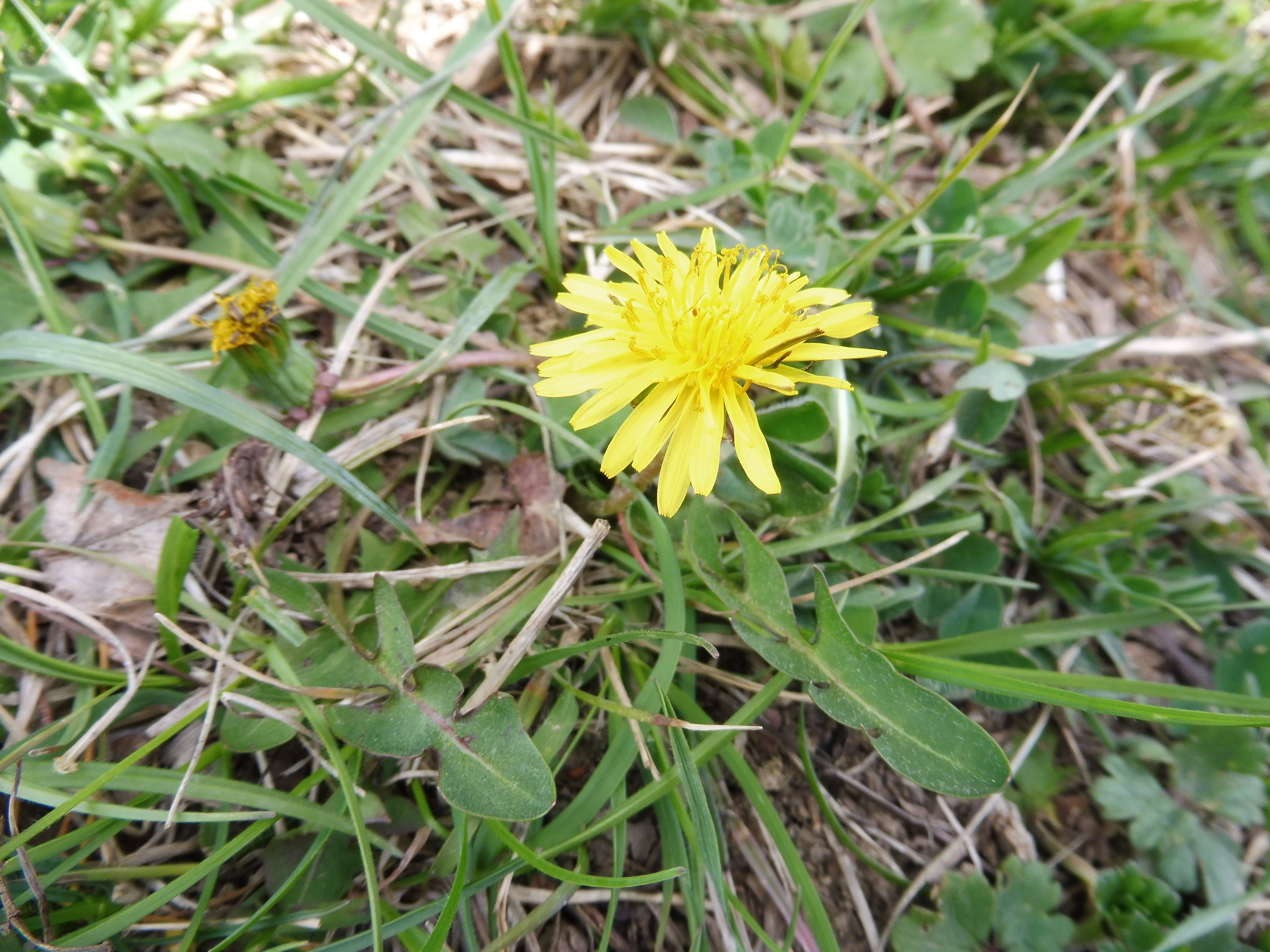 Pflaumenfarbener Löwenzahn (Taraxacum bellicum) Naturschutzgebiet Eichenhain Stuttgart-Riedenberg 14. April 2018